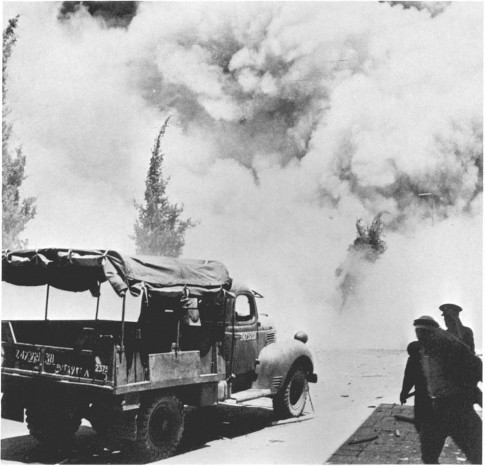 في 22 تموز/ يوليو 1946 أصدر مناحم بيغن، قائد عصابة الإرغون أمراً بتفجير الجناح الجنوبي من فندق الملك داود في القدس. وكان الجناح المقر الرئيسي للإدارة البريطانية المدينة في فلسطين. قتل في هذا الحادث 91 موظفاً وزائراً من المدنيين، بينهم 41 عربياً و28 بريطانياً و17 يهودياً. عصابة الإرغون هي أول من لجأ إلى استخدام المتفجرات على نحو متواصل ضد الأهداف المدنية في فلسطين منذ سنة 1937. على أن التفنن في استخدام المتفجرات بلغ ذروته عندما استحدثت الإرغون، بقيادة بيغن، أسلوب السيارات المفخخة الذي أدخله بيغن إلى الشرق الأوسط في 1947 ـ 1948.